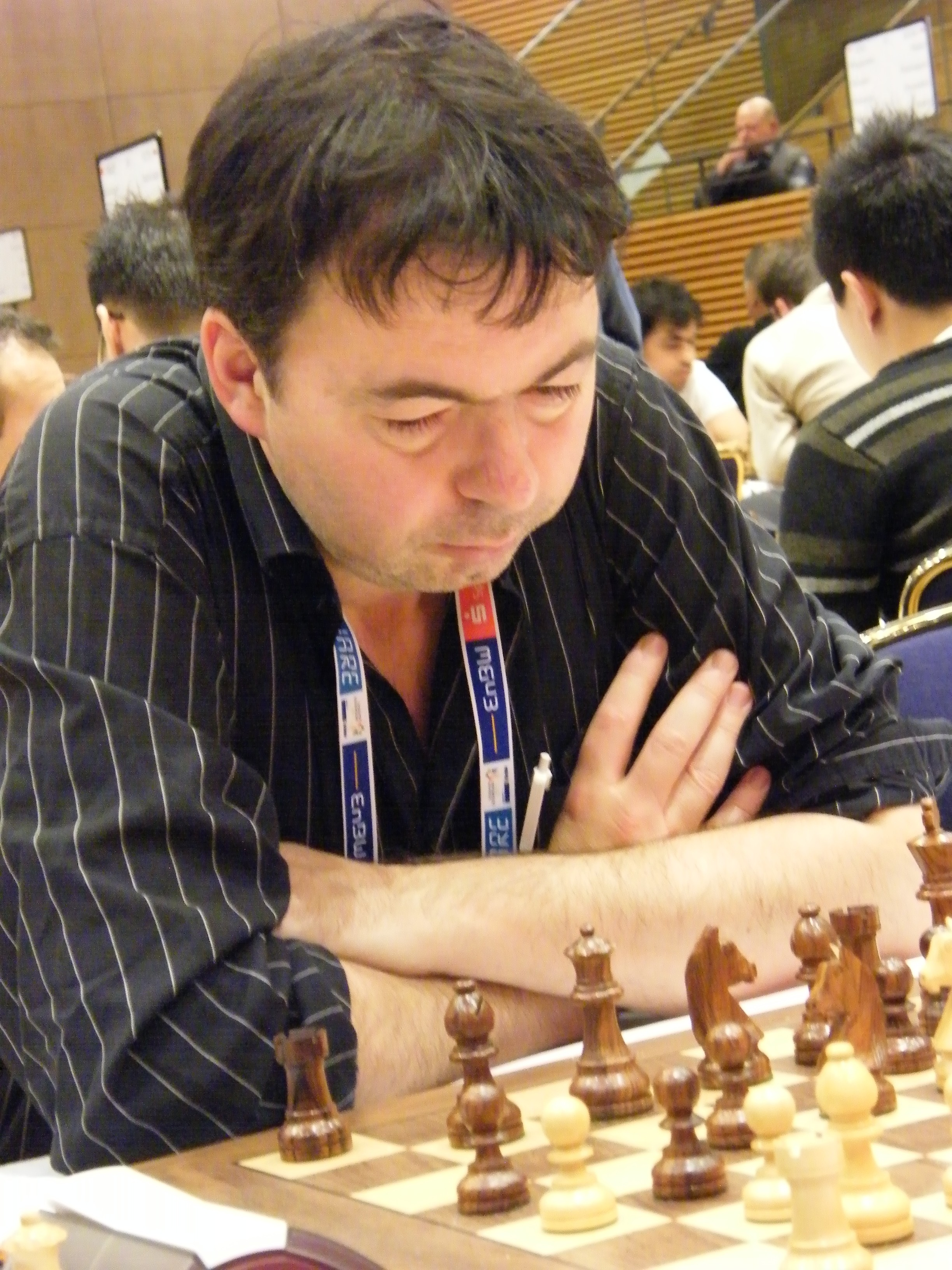 GM Joseph Gallagher bei der Schacholympiade 2008 in Dresden